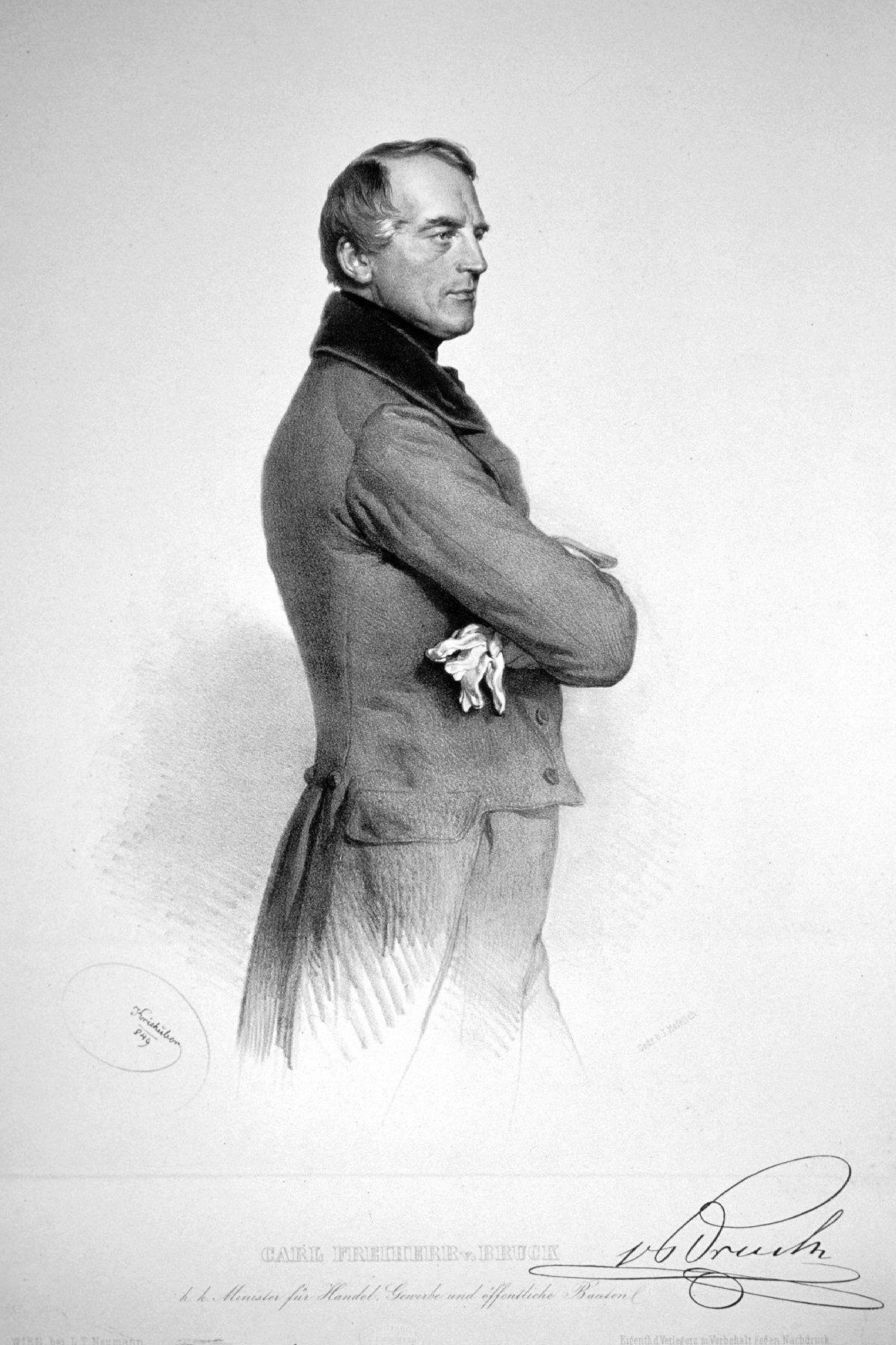 Karl Ludwig von Bruck (1798-1860), Freiherr, österreichischer Staatsmann, Diplomat, Abgeordneter in der Frankfurter Nationalversammlung. Lithographie von Josef Kriehuber., 1849